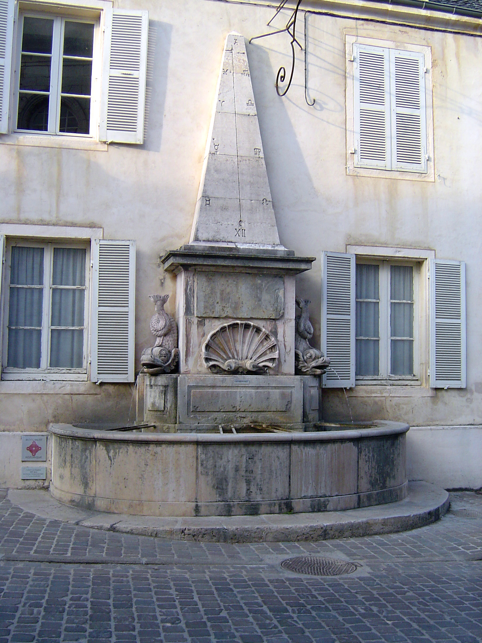 Fontaine aux dauphins, à Givry (Saône-et-Loire)